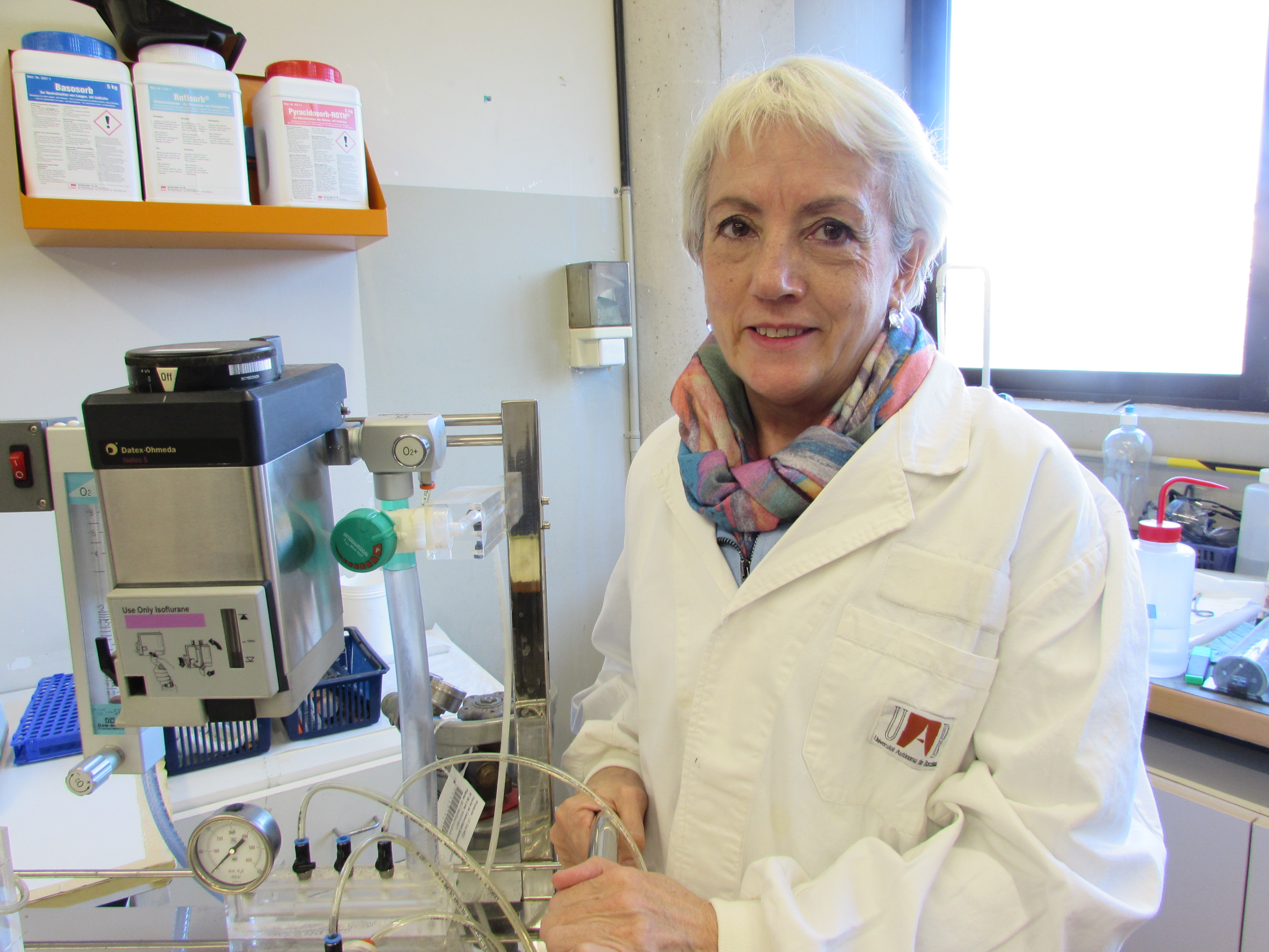 Fotografia de Patri Vergara